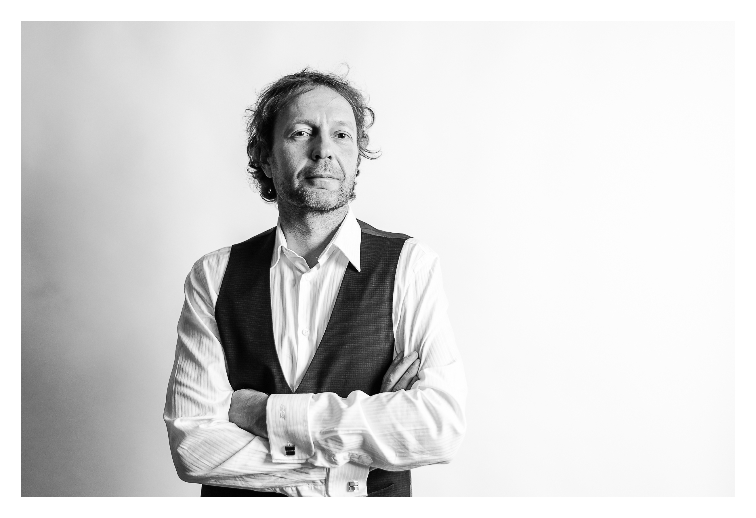 Portrait Steve Sabor